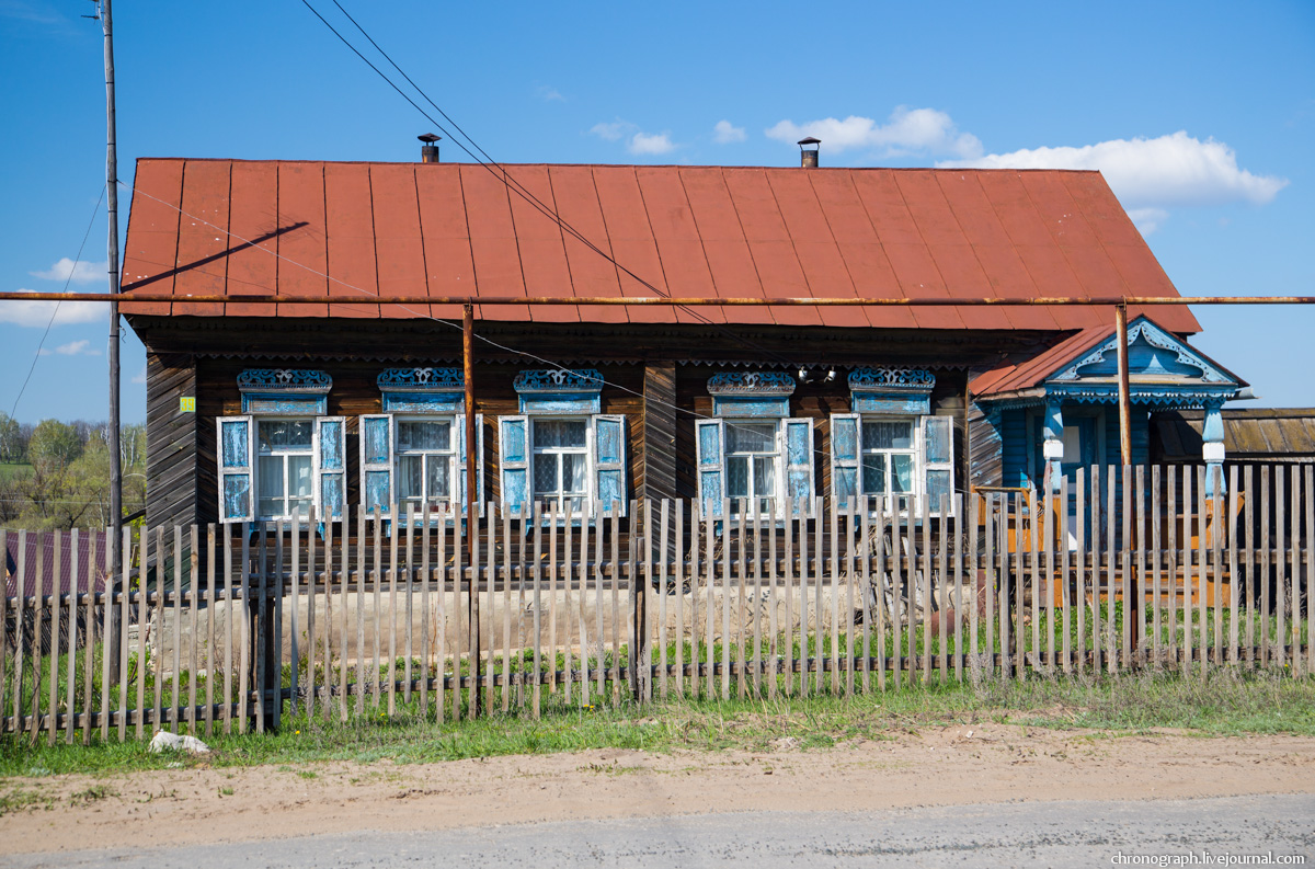 Жилой дом в селе Старая Бинарадка, Самарская область, Россия